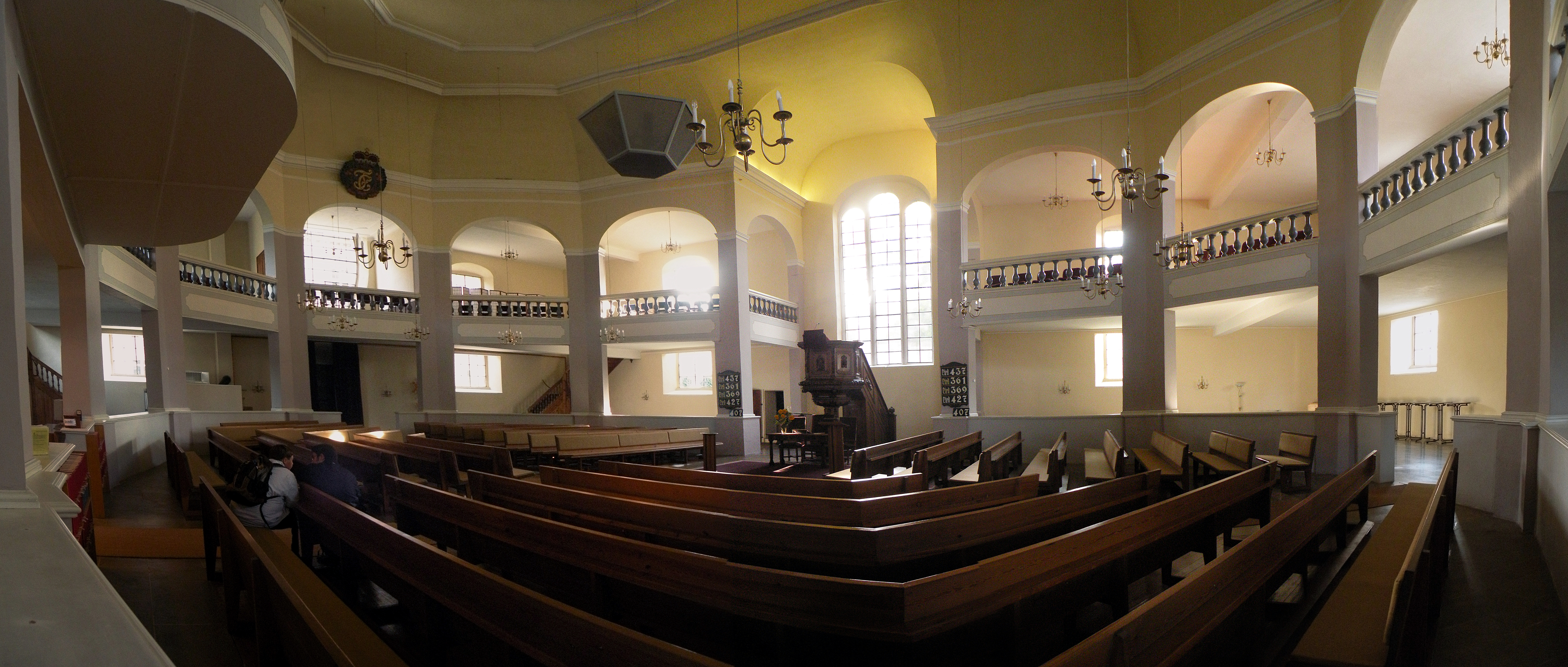 Эрланген.Интерьер церкви гугенотов.